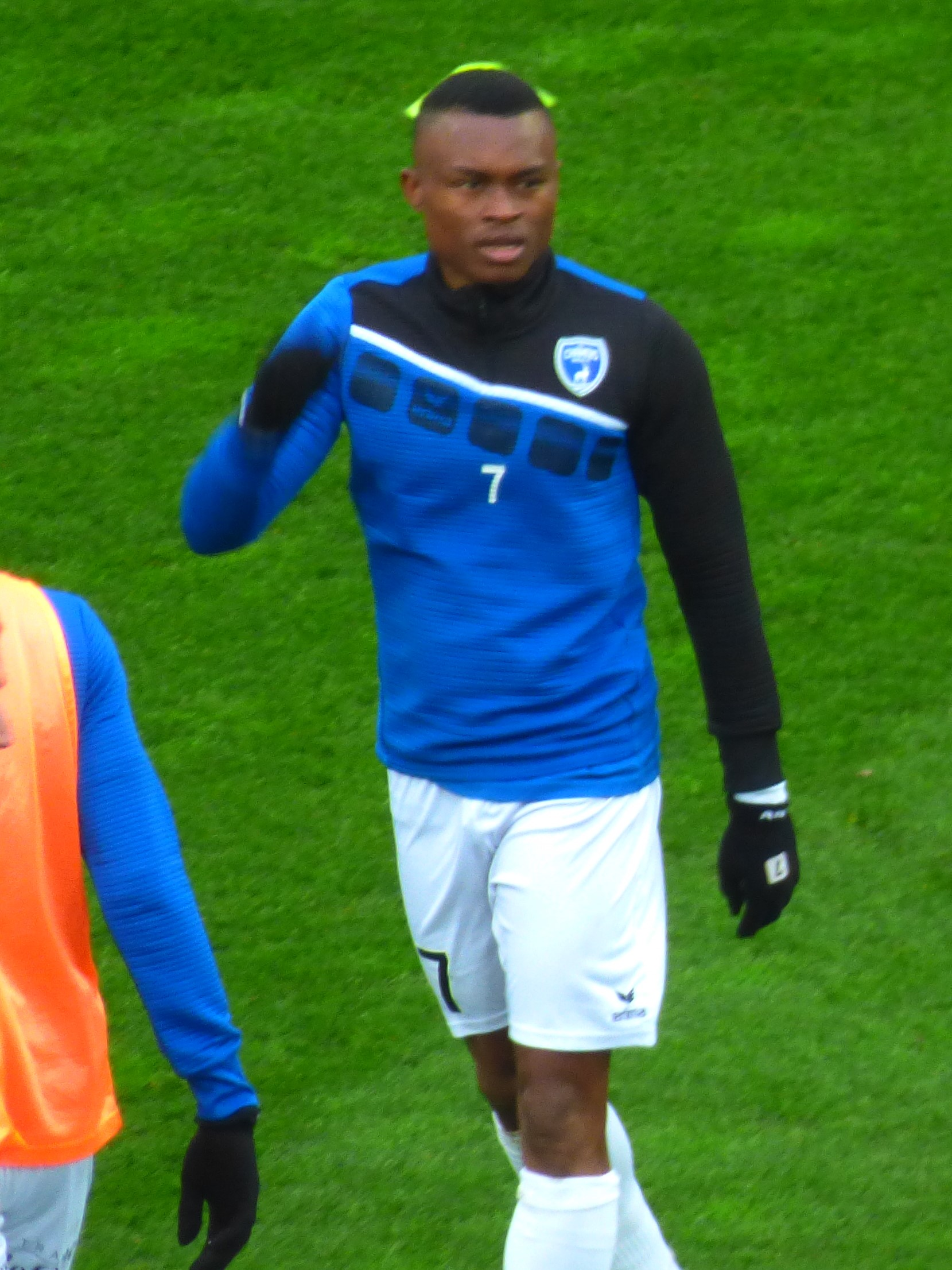 David Djigla avant le match Lens / Niort, le 21 décembre 2019, comptant pour la dix-neuvième journée du championnat de France de football de Ligue 2 2019-2020.